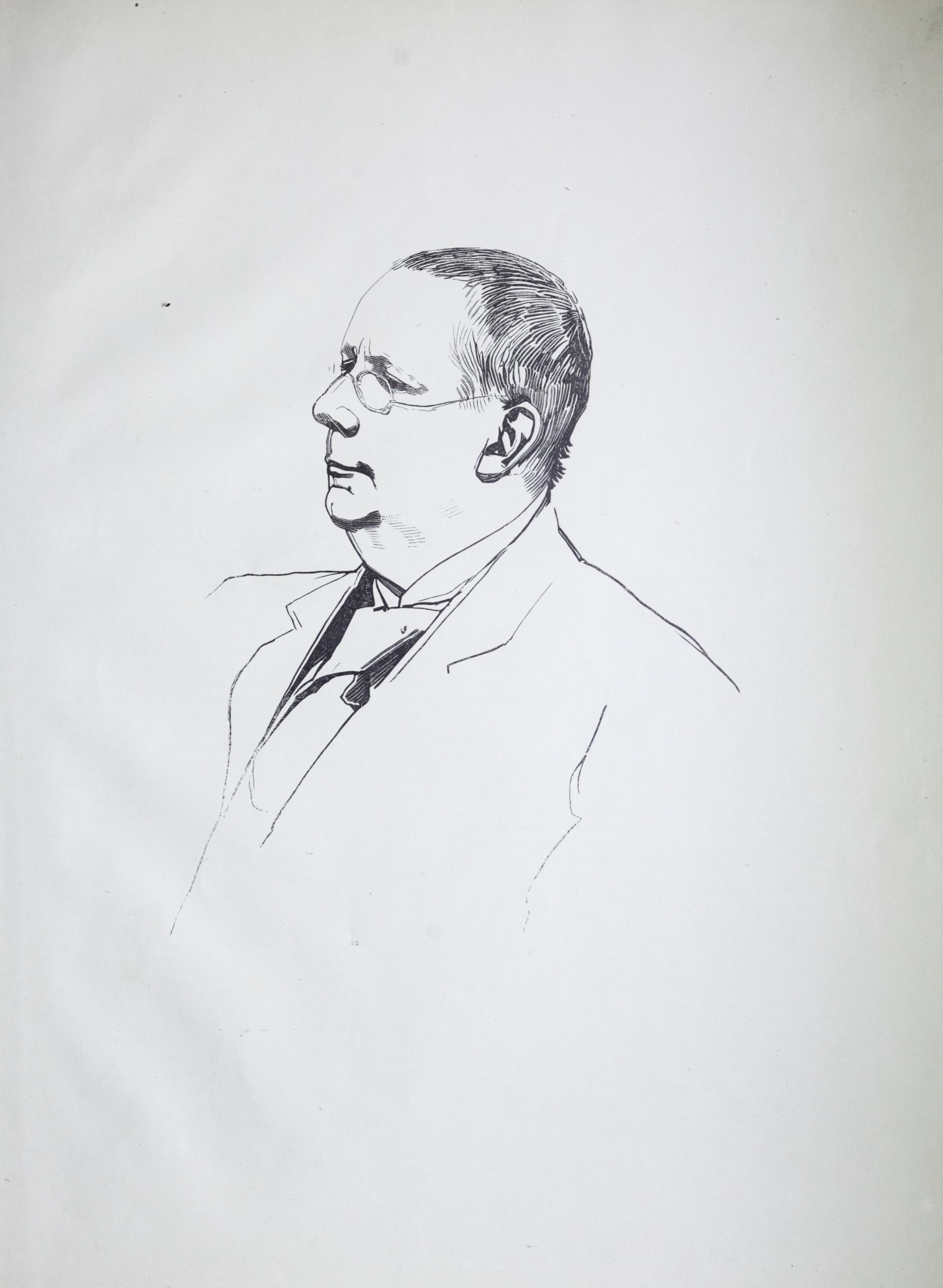 Illustrasjon hentet fra boken "12 af vore samtidige" av Krohg, Christian og utgitt av Feilberg & Landmark (Kristiania, 1895)Depicted person: Johan Bøgh